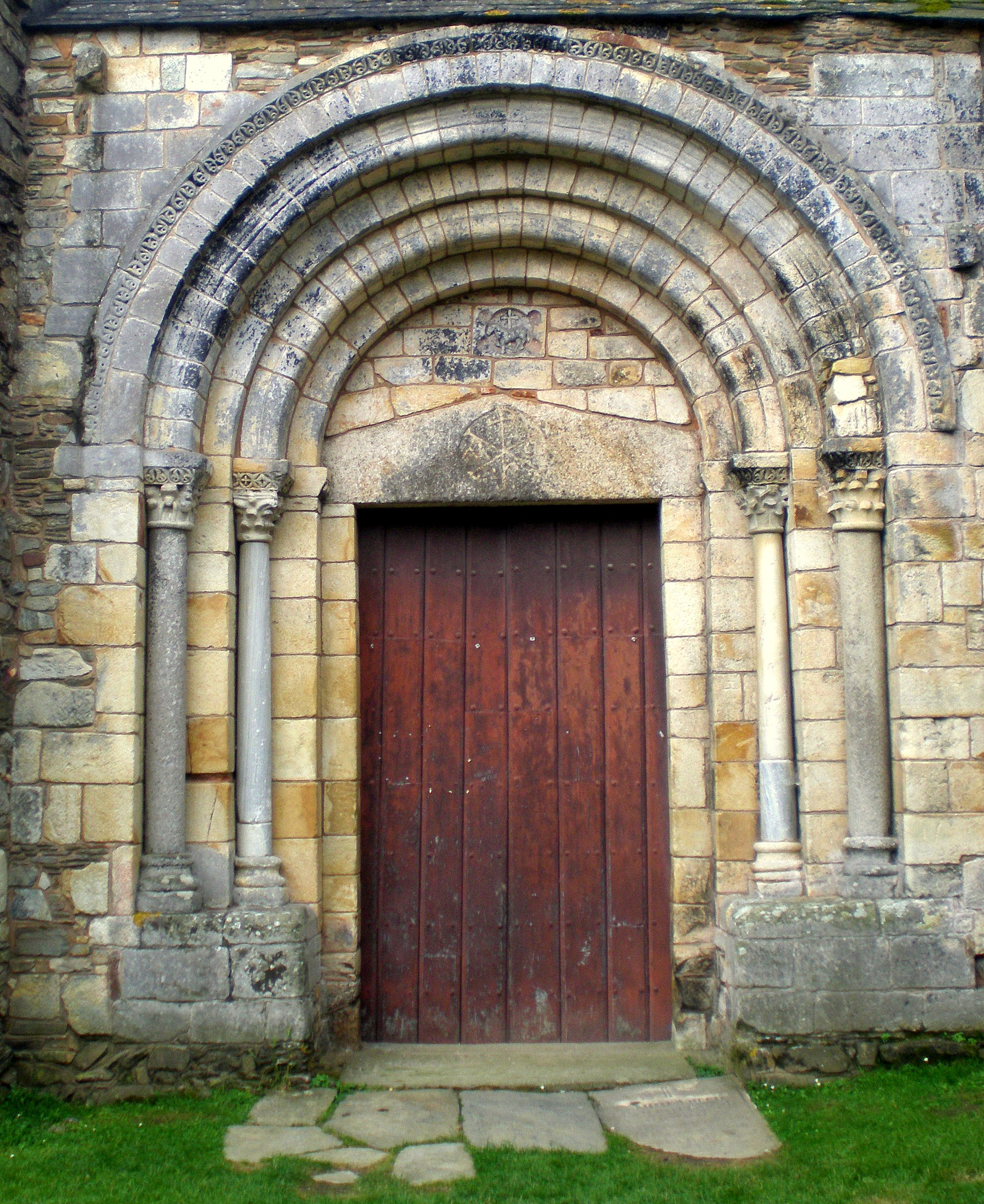 San Martiño de Mondoñedo, Foz, España. - Puerta principal.